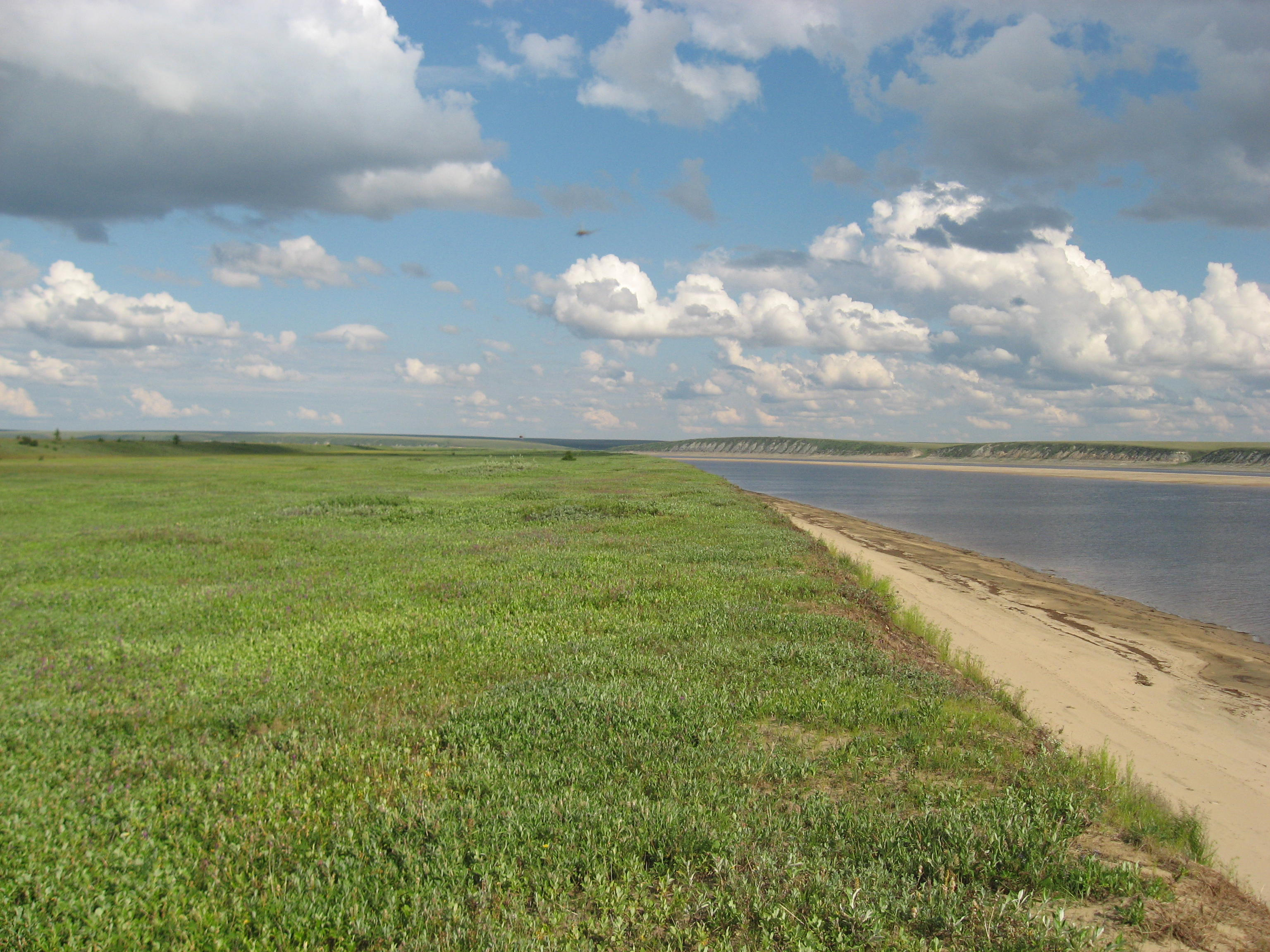 Автор: Vladislav Kyamyarya